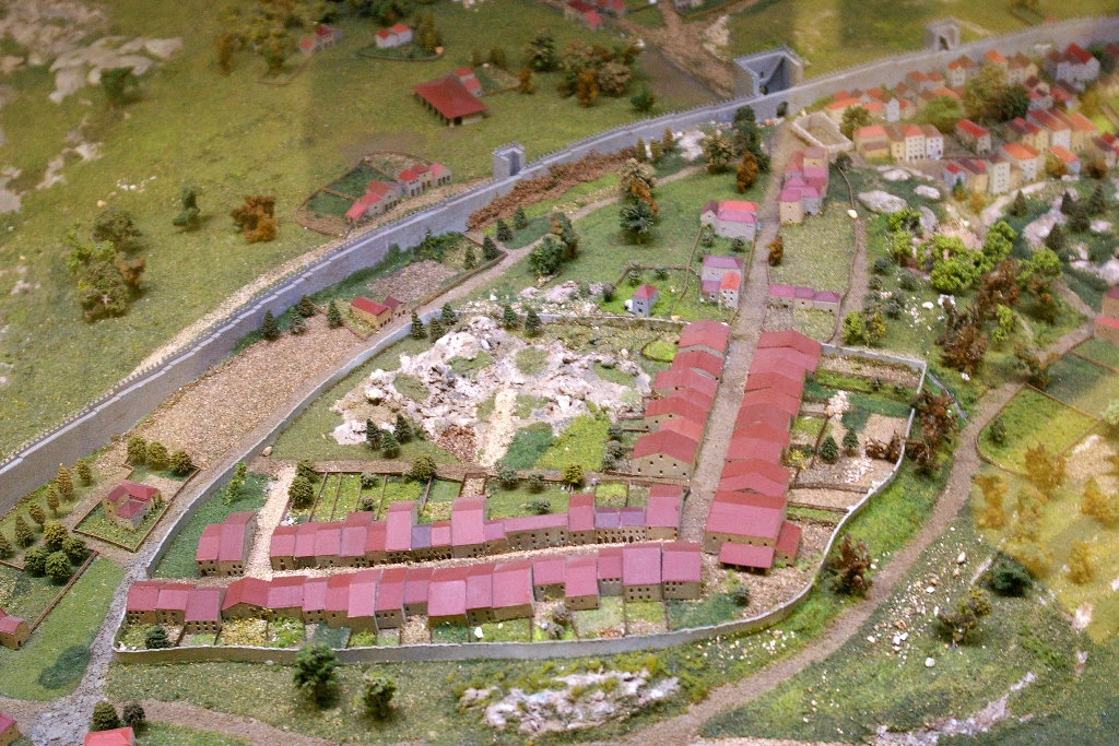 "Casa do Infante" museum in Porto, Portugal